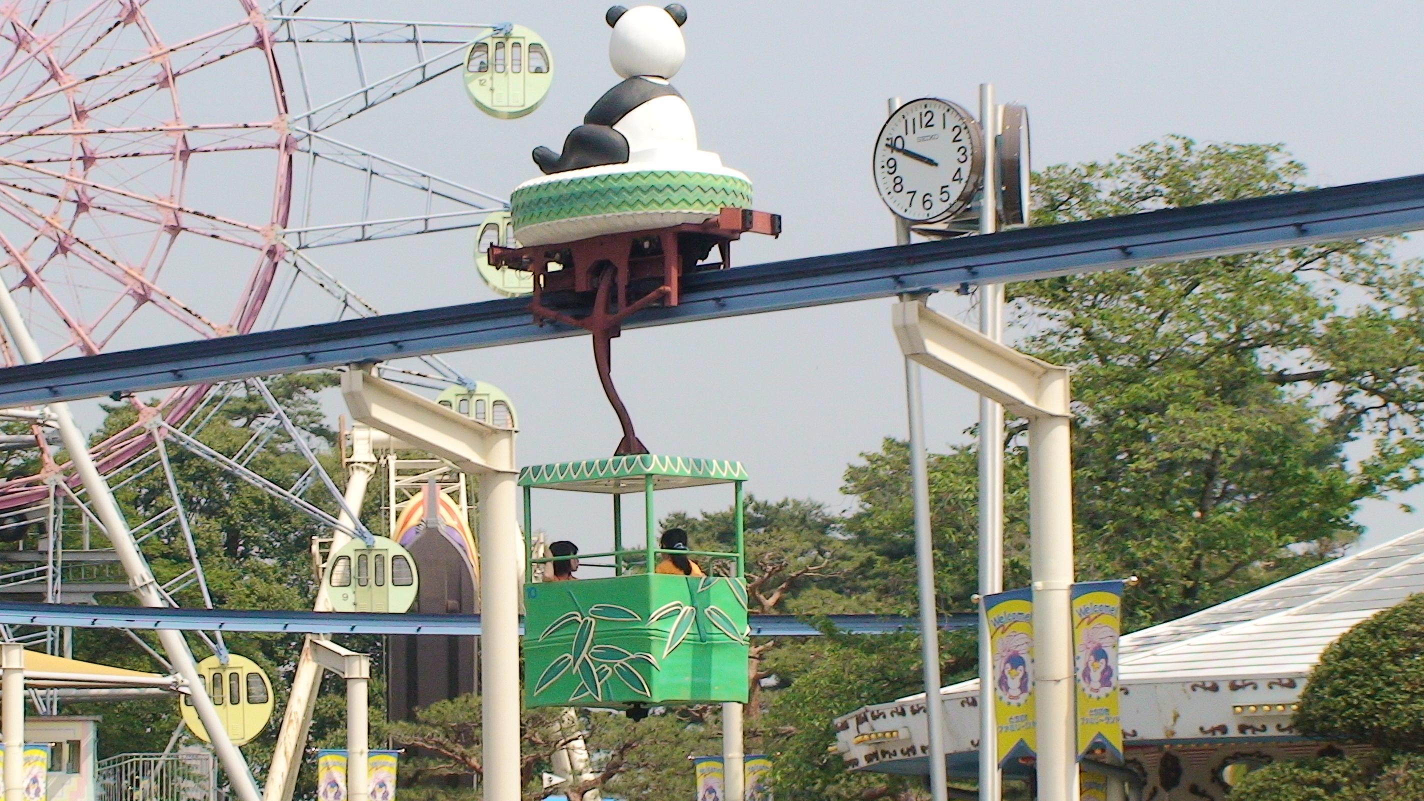 とちのきファミリーランド(スカイパンダ)